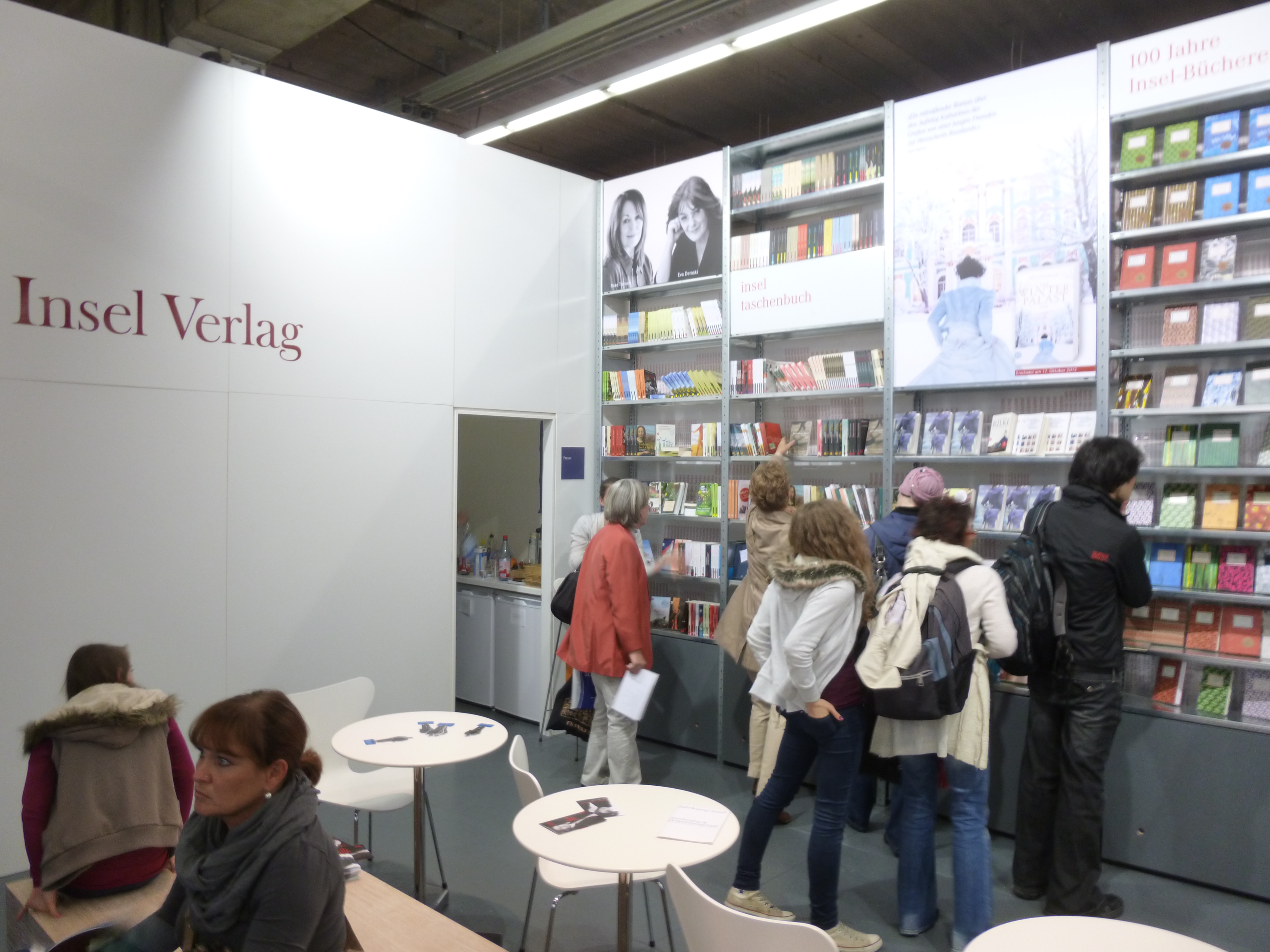 stando de la eldonejo Insel en la Frankfurta librofoiro 2012